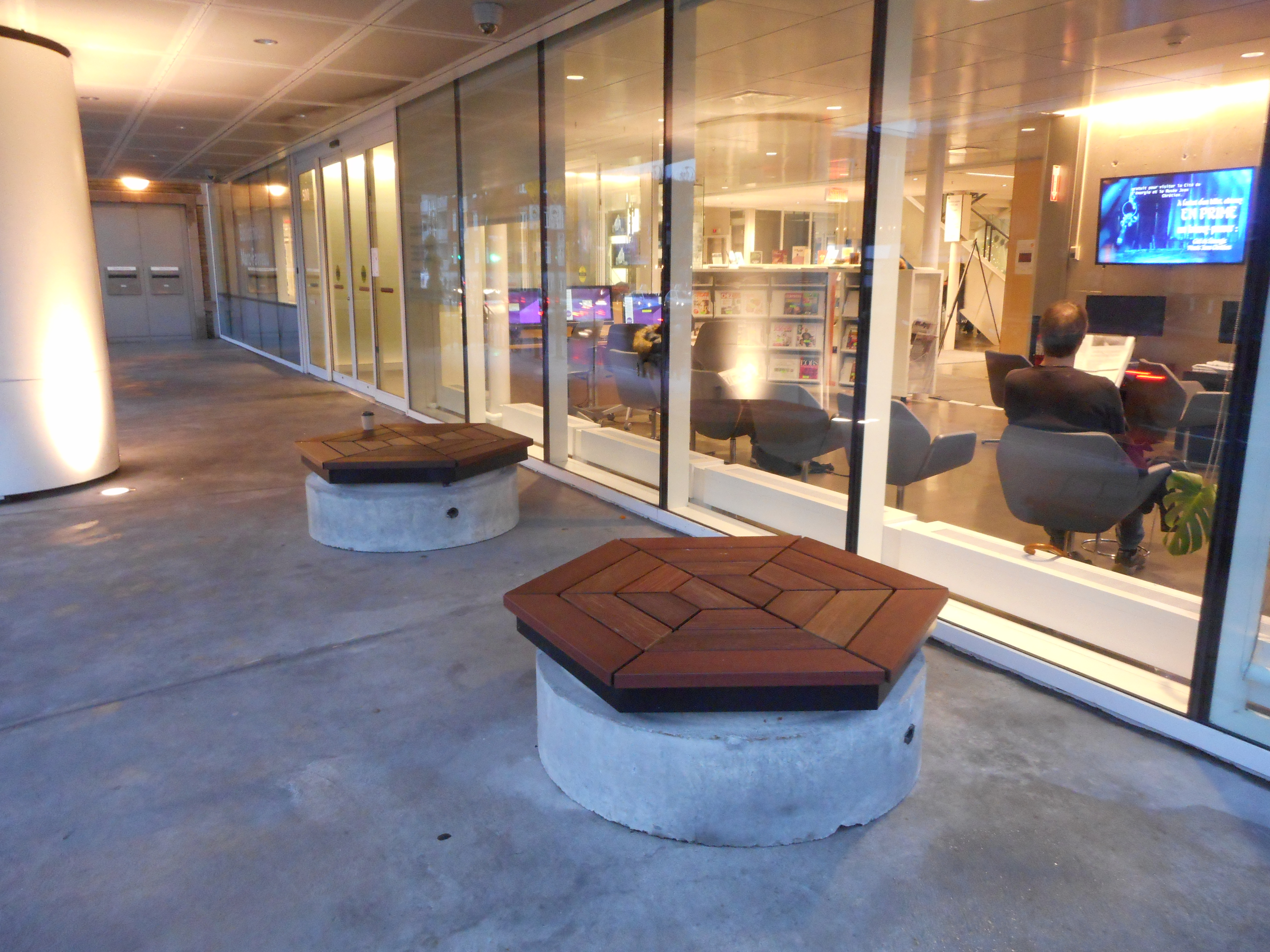 Bibliothèque Marc-Favreau, 500, boulevard Rosemont, Montréal, à deux pas de la station de métro Rosemont.